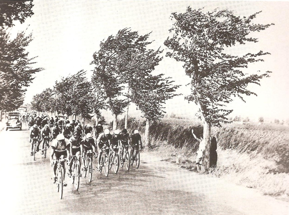 L'Equipe de France sur le Tour de France 1934